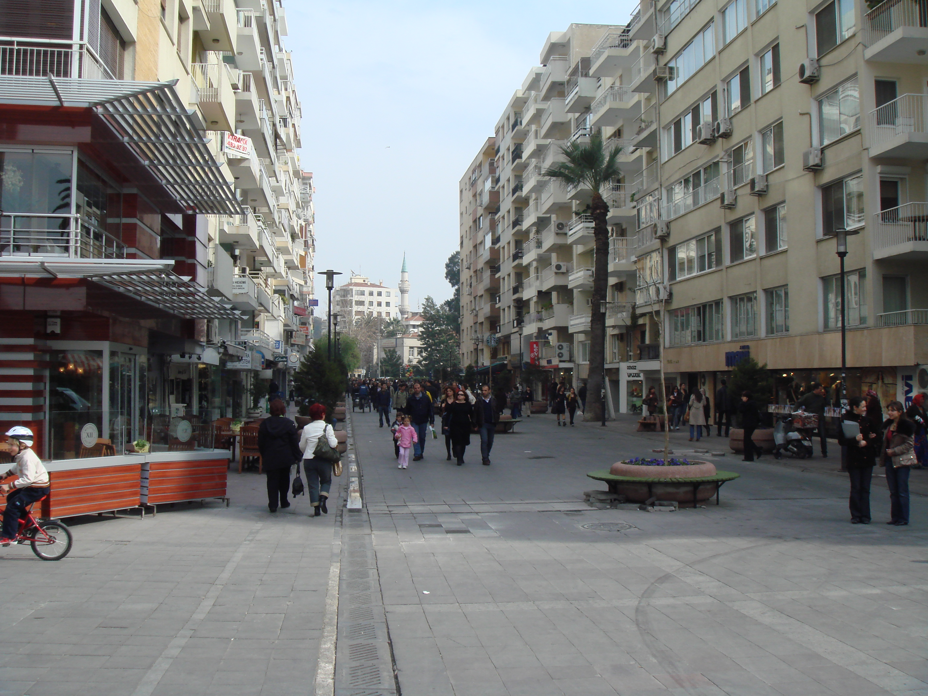 Vormittagliche Stadtszenerie im Herzen Izmirs.